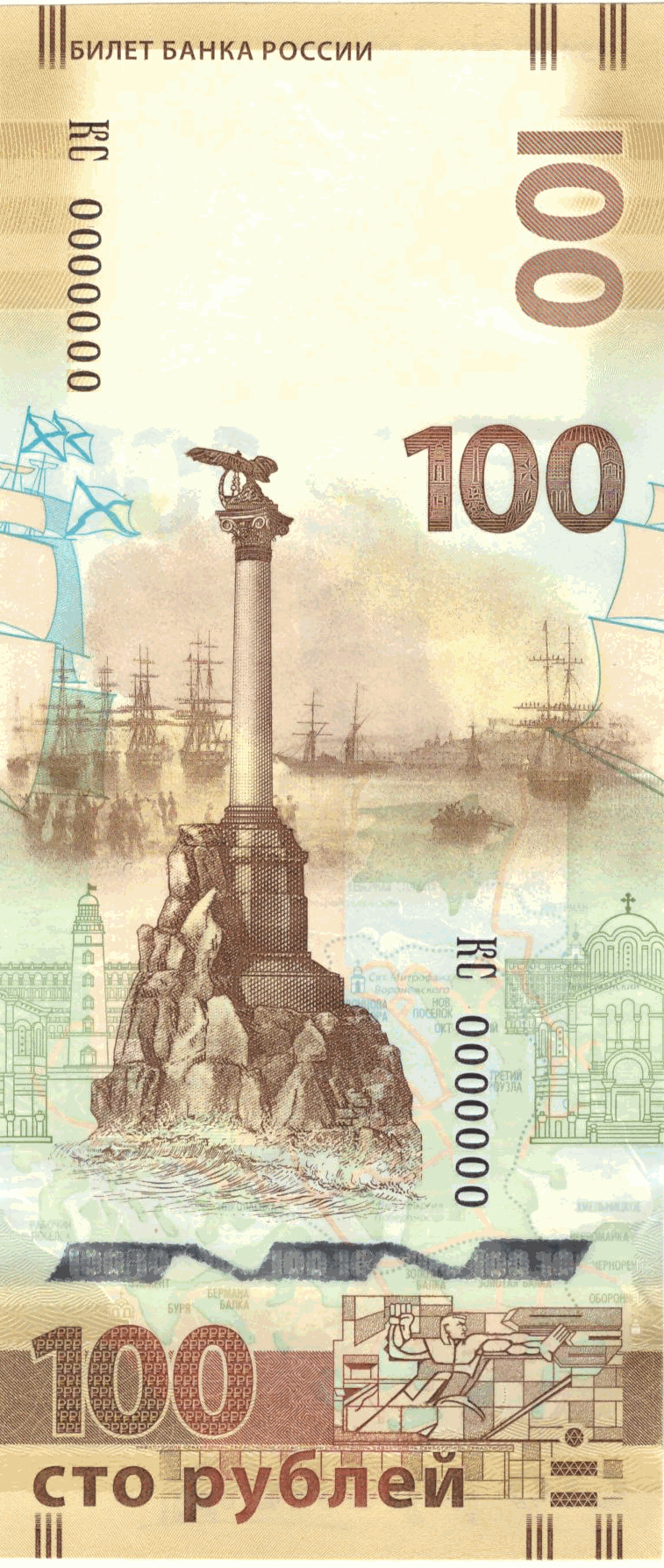 Основные изображения стороны, посвященной Севастополю – Памятник затопленным кораблям в Севастопольской бухте, фрагмент картины И.К. Айвазовского «Русская эскадра на Севастопольском рейде».